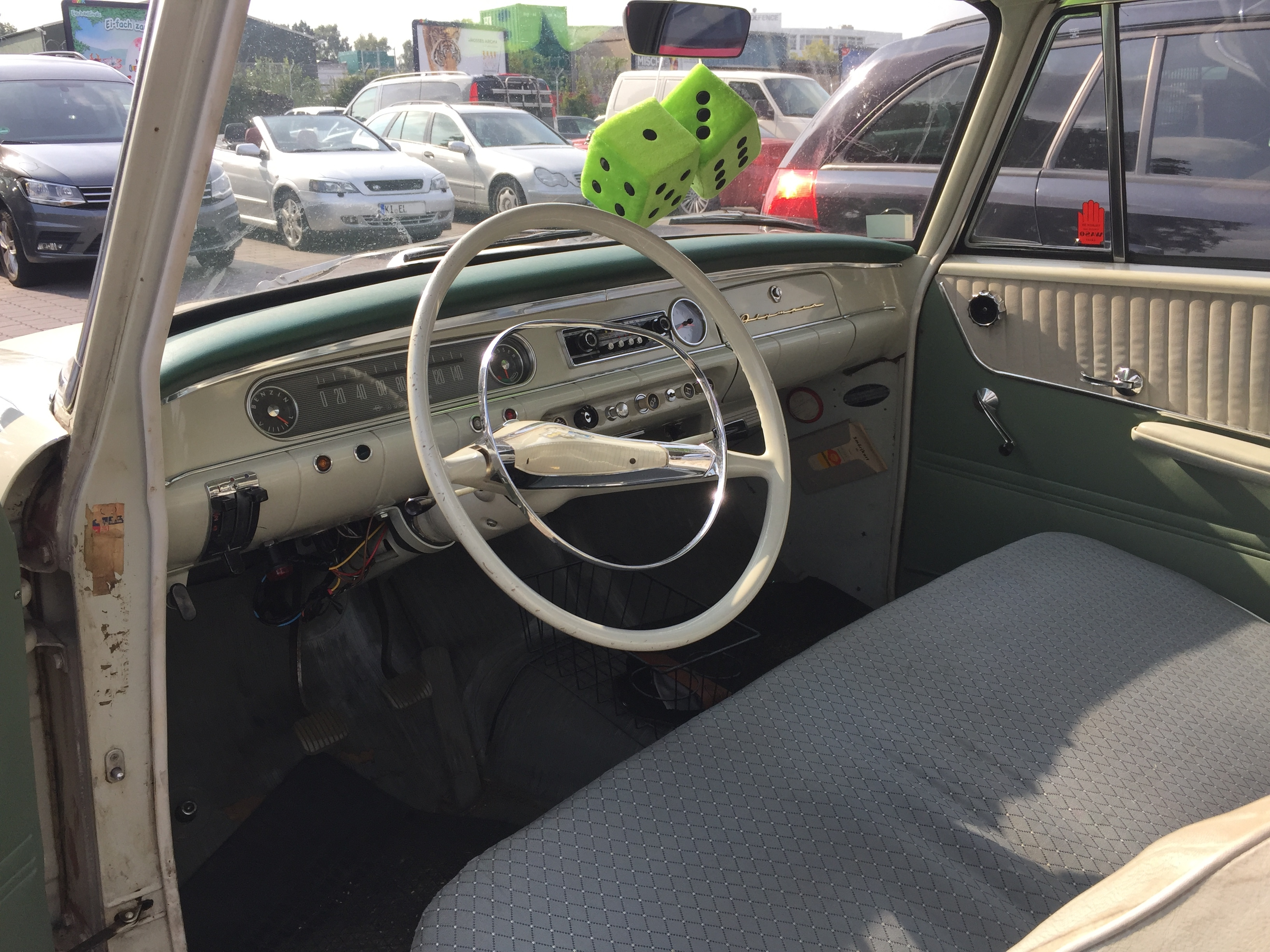 Opel Rekord P2 1700 Cockpitansicht